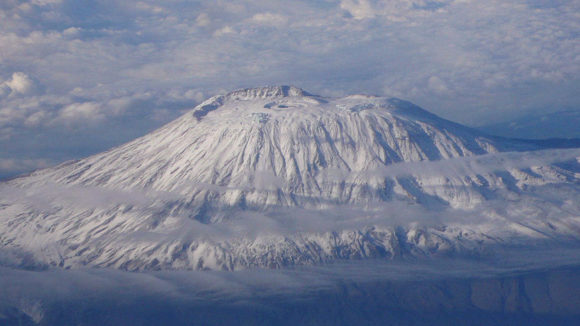 foto aerea del kilimagiaro innevatissimo